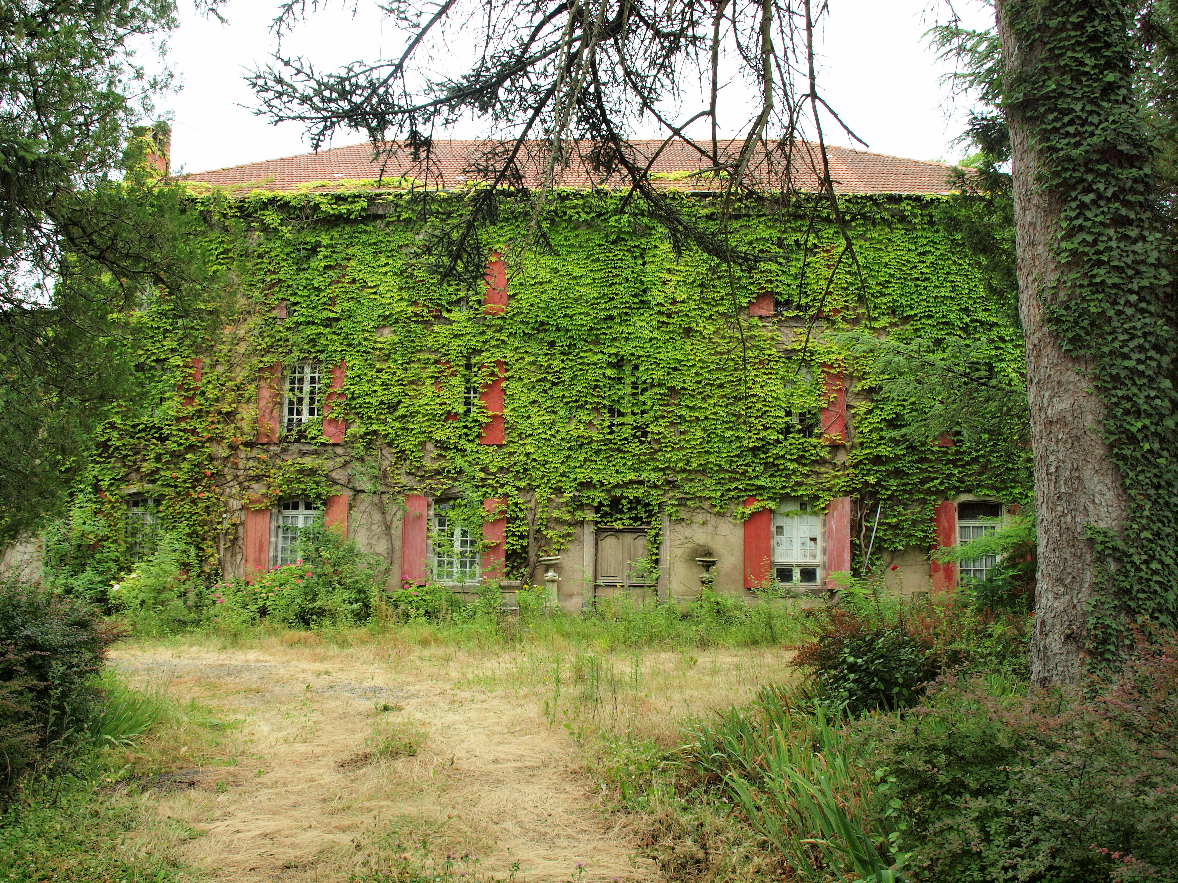 Bègues (Allier, France)